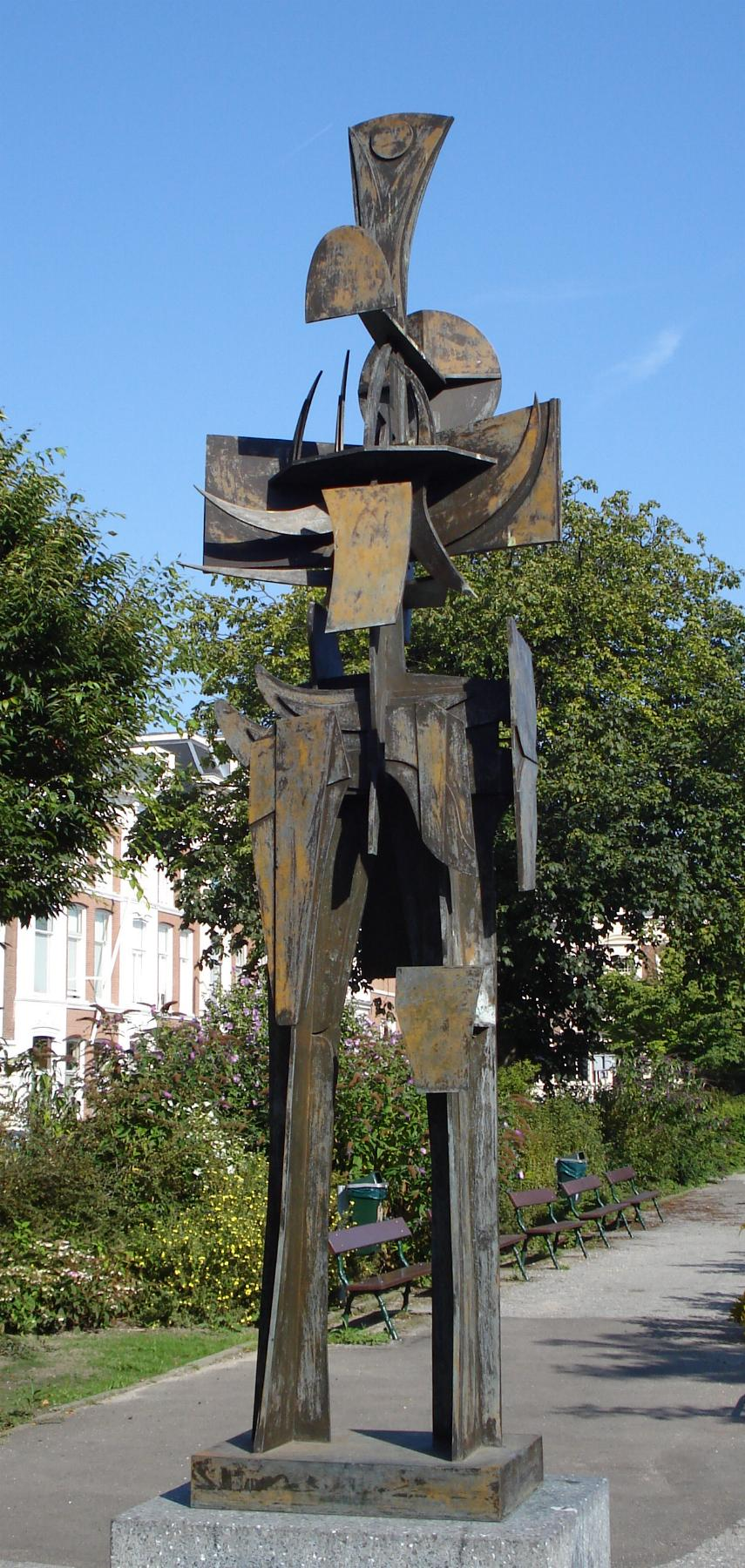 Den Haag, Nassauplein. Kunstwerk "Wachter" van Shinkichi Tajiri. Den Haag/The Netherlands.